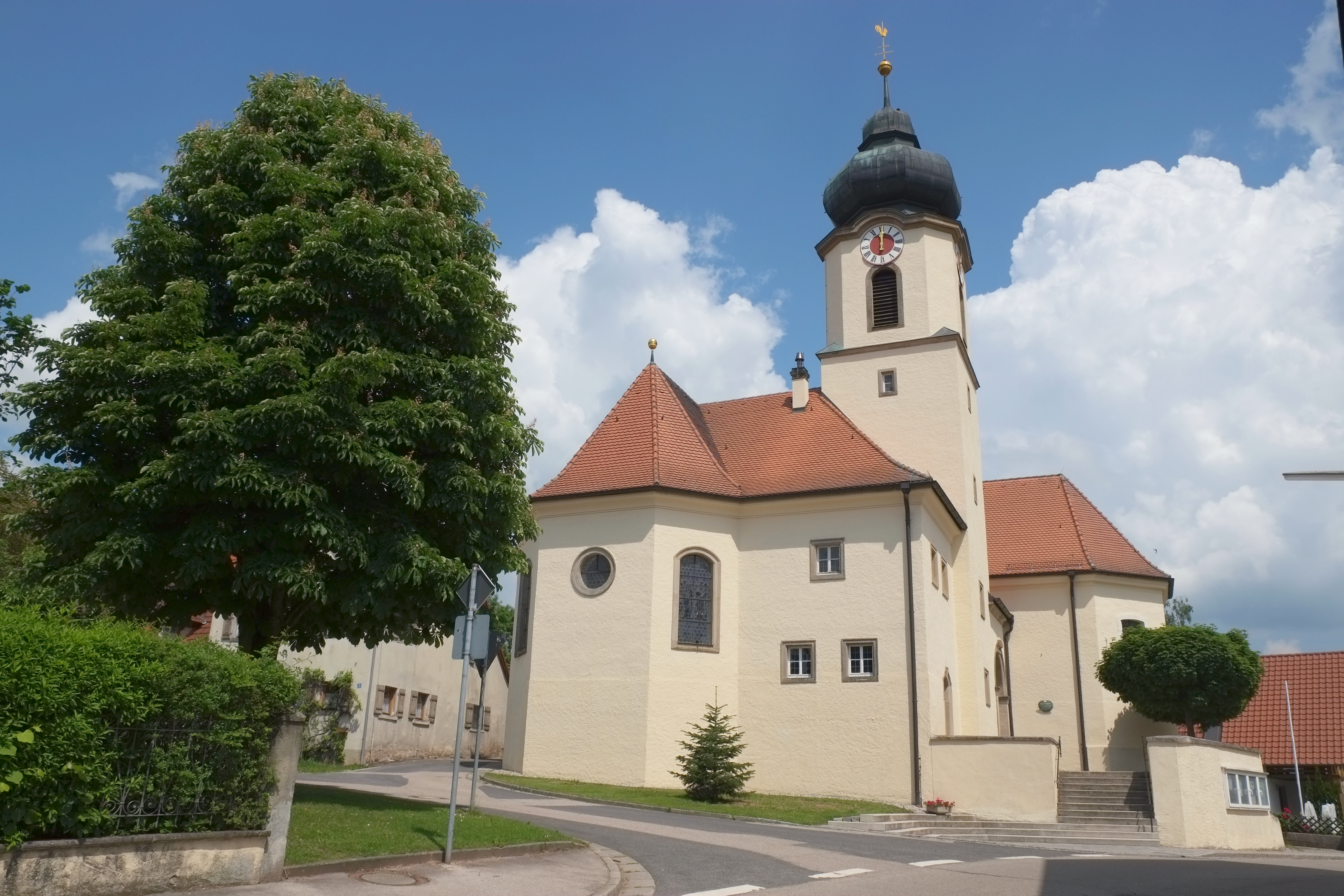 katholische Pfarrkirche St. Jakobus der Ältere in Elbersroth, einem Stadtteil von Herrieden im Landkreis Ansbach in Mittelfranken (Bayern)